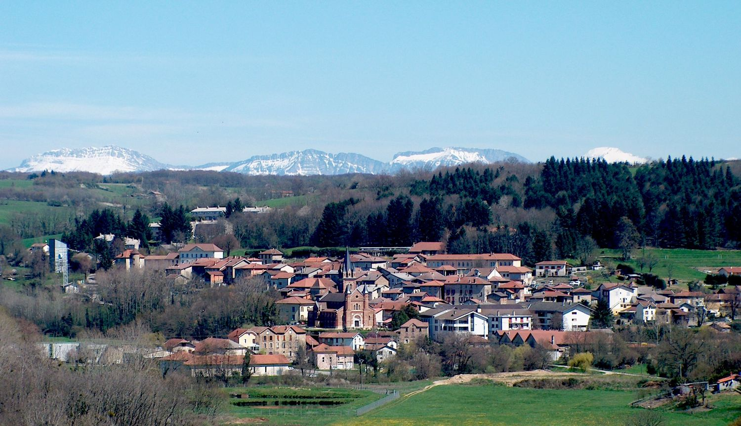 Le village de Roybon vue de l'ouest (vallée de la Galaure) vers l'est